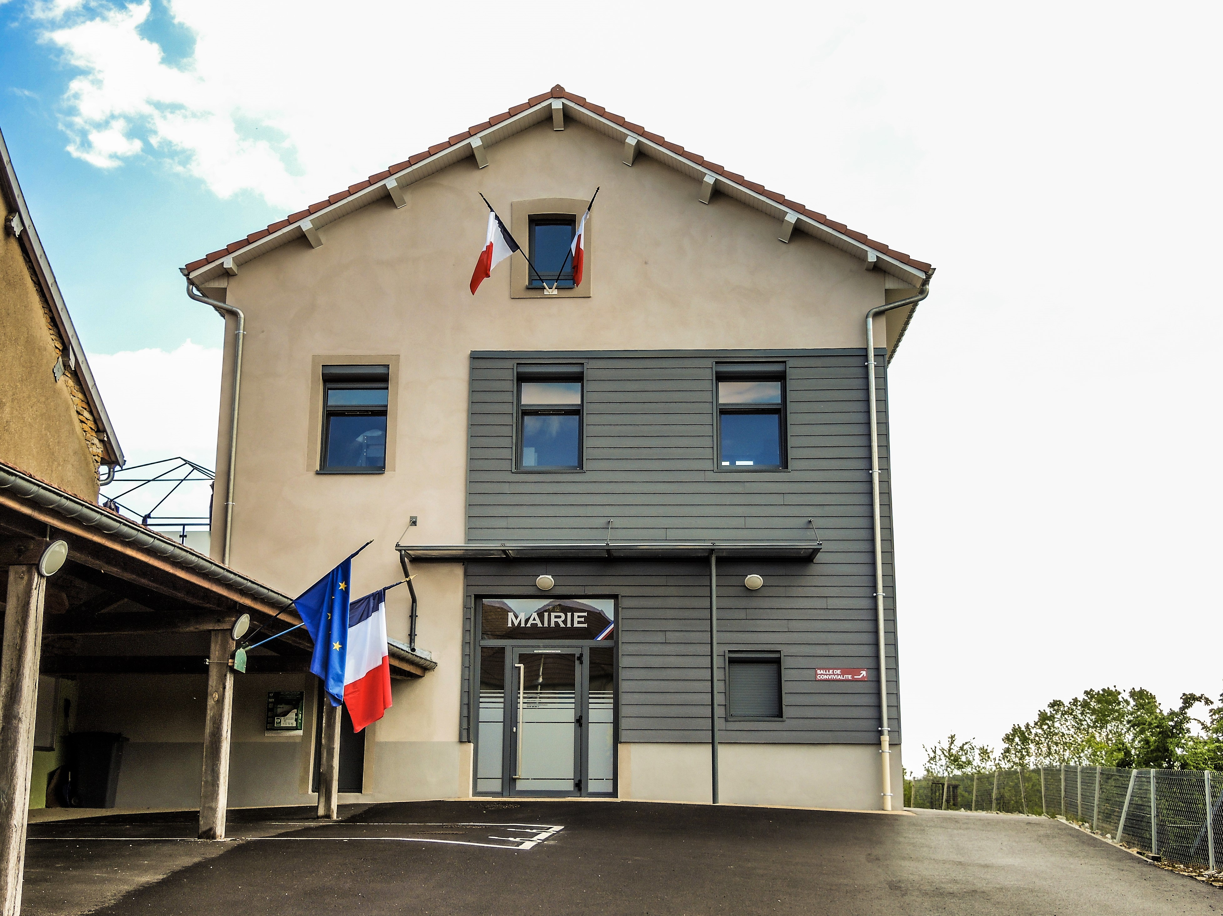 Mairie